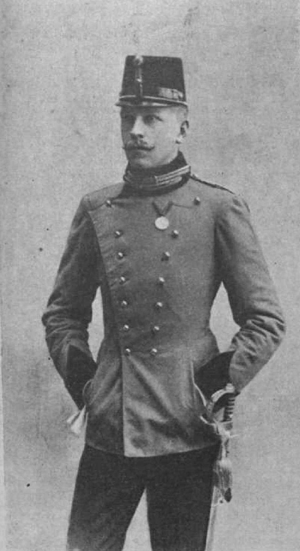 Otto zu Windisch-Graetz